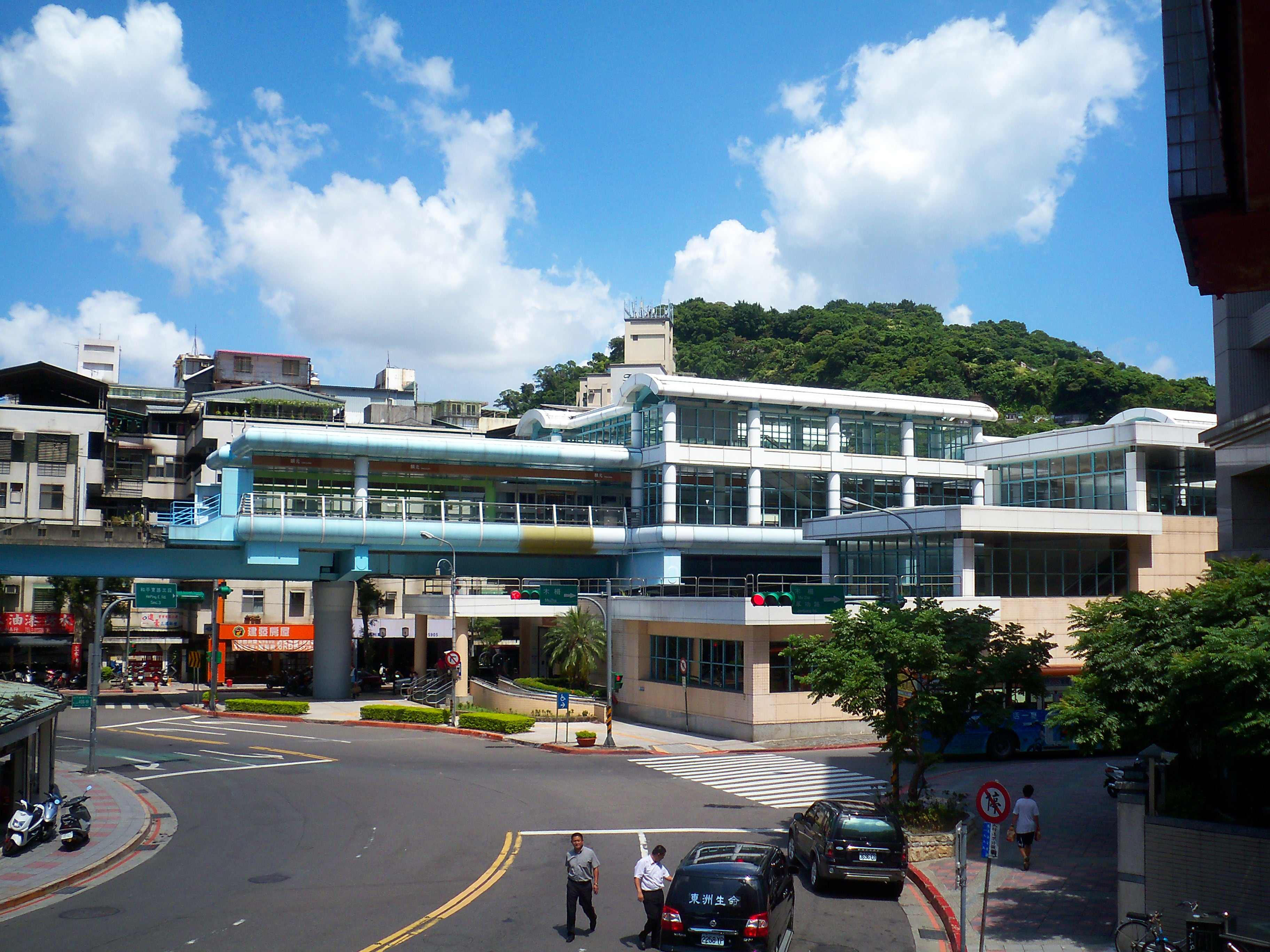 台北捷運文山線麟光駅。